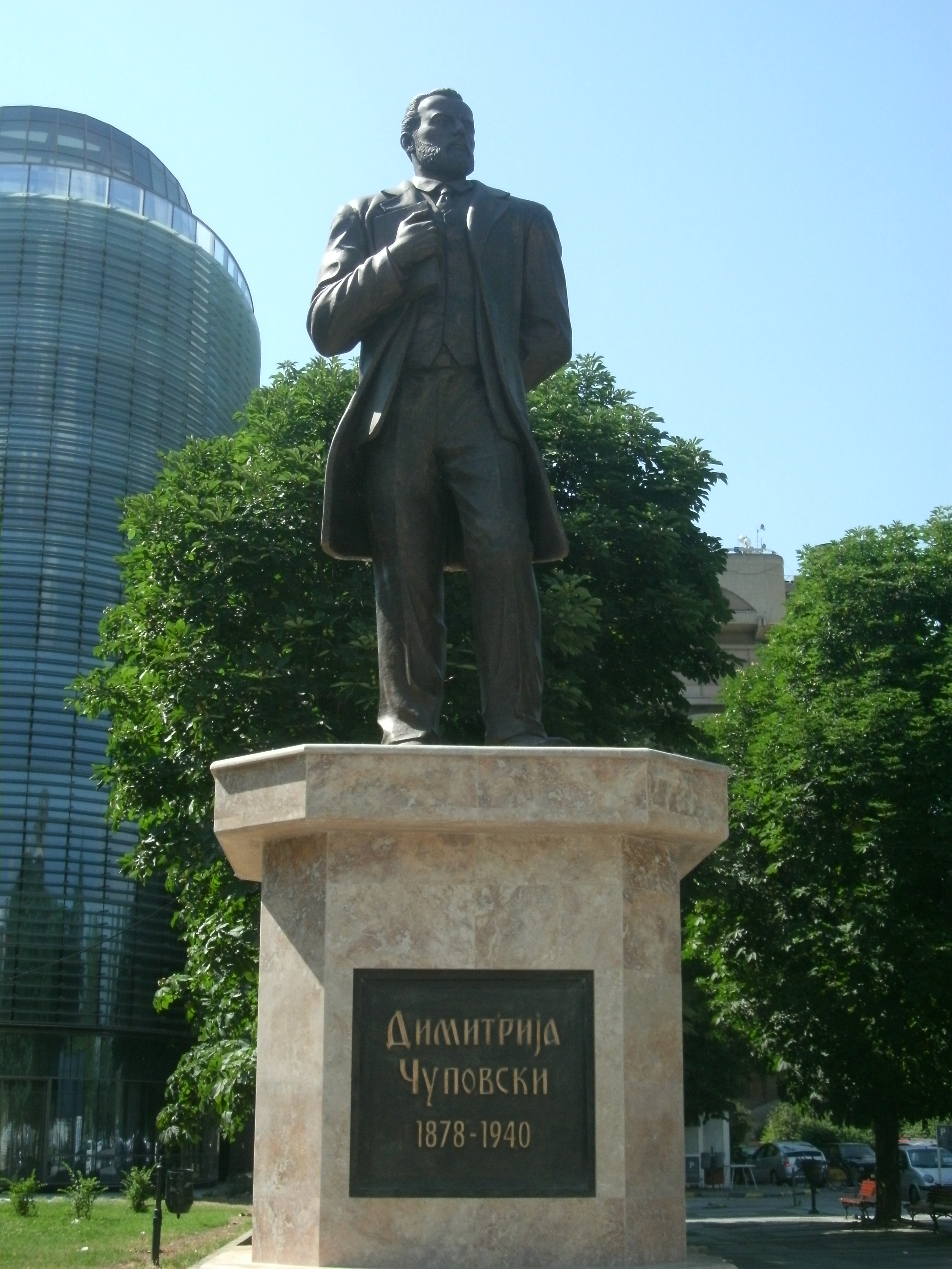 Димитрија_Чуповски